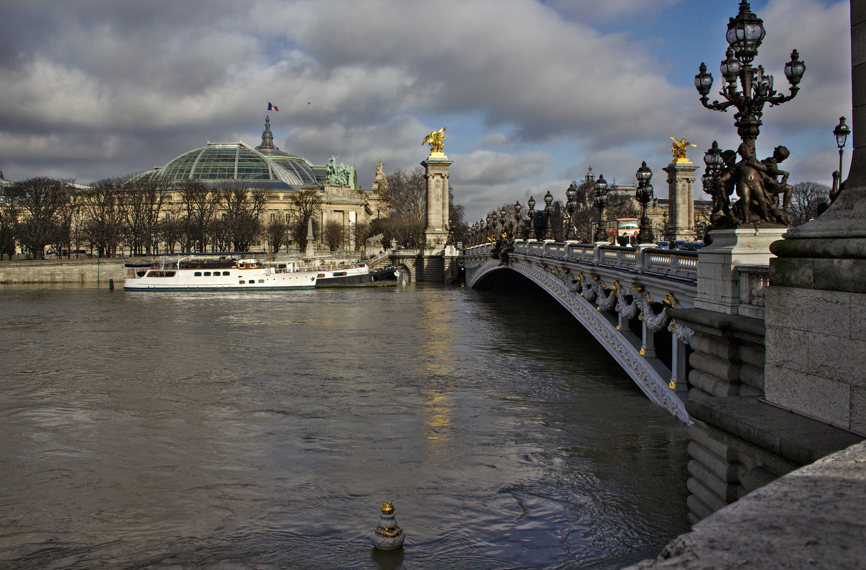 26-Jan-2018 Crue de la Seine - Pont Alexandre 3 - Paris